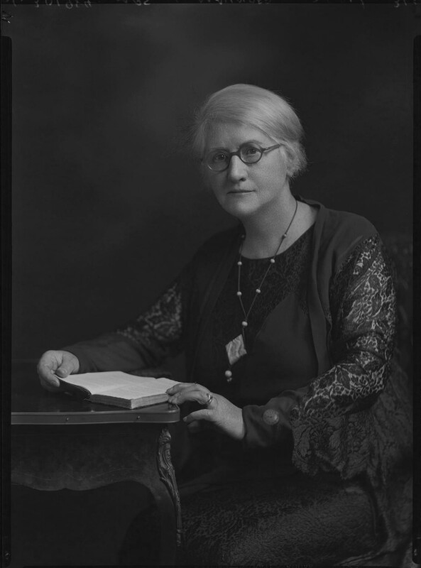 Annie Scott Dill Maunder, nascuda Russell (1868-1947), astrònoma nord irlandesa.